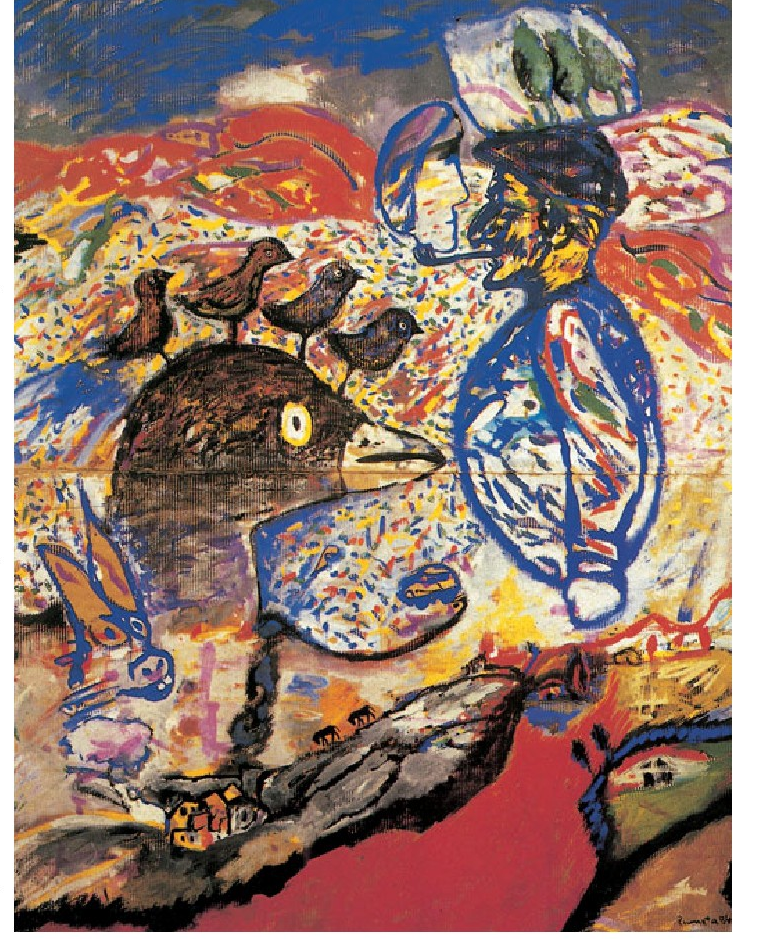 Cuando el cielo casi cumplía las quince horas (1984), Jose Luis Zumetarena. Zumeta izan da azken aldiotan obra zabal eta ugariena egin duen margolarietako bat.